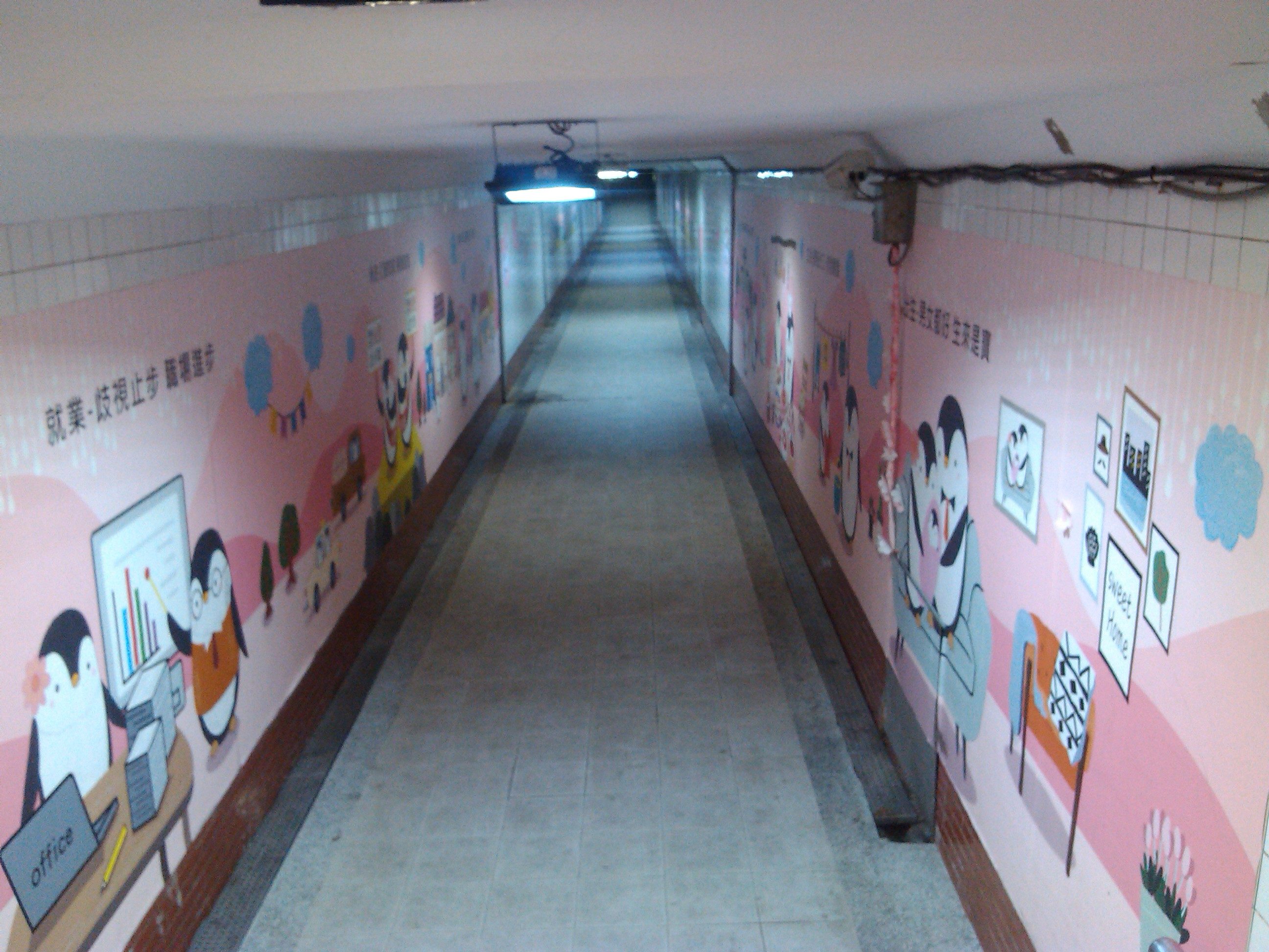 位於雙溪區雙溪火車站旁